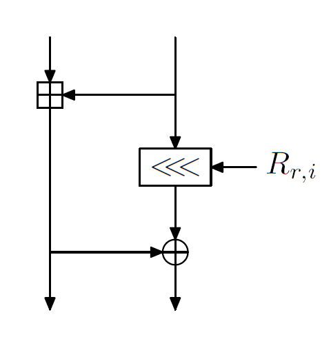 Skein Mix Function